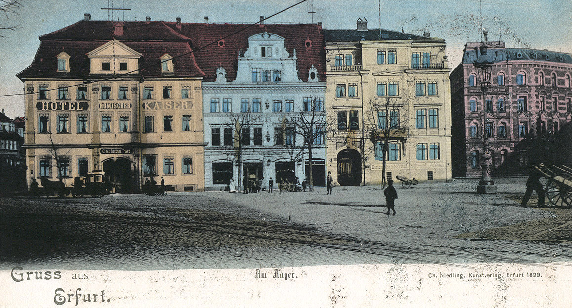 Hotel Römische Kaiser, am Anger in Erfurt